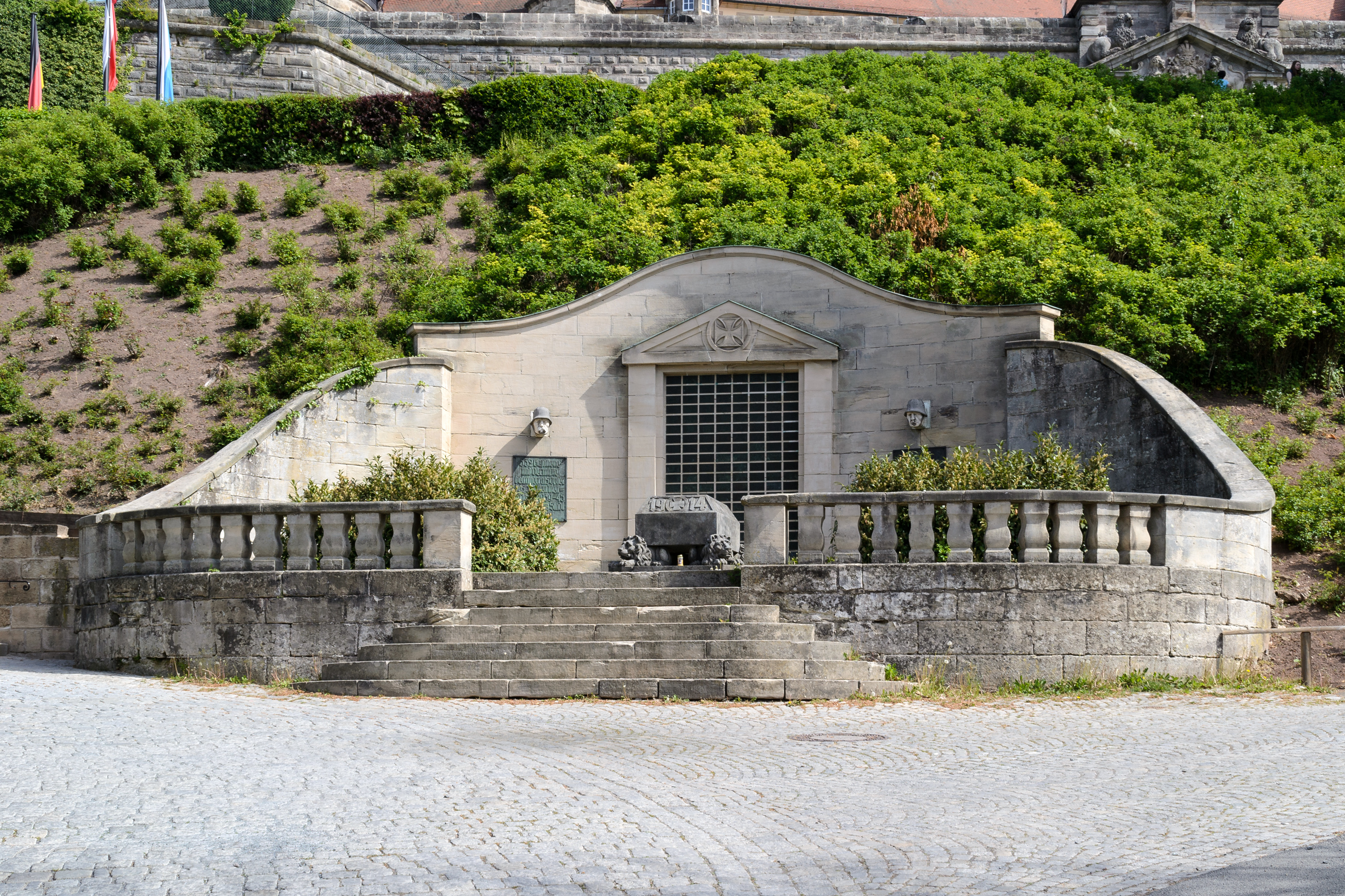 Ehrenmal am Fuß der Festung Rosenberg in Kronach für die Gefallenen der beiden Weltkriege.